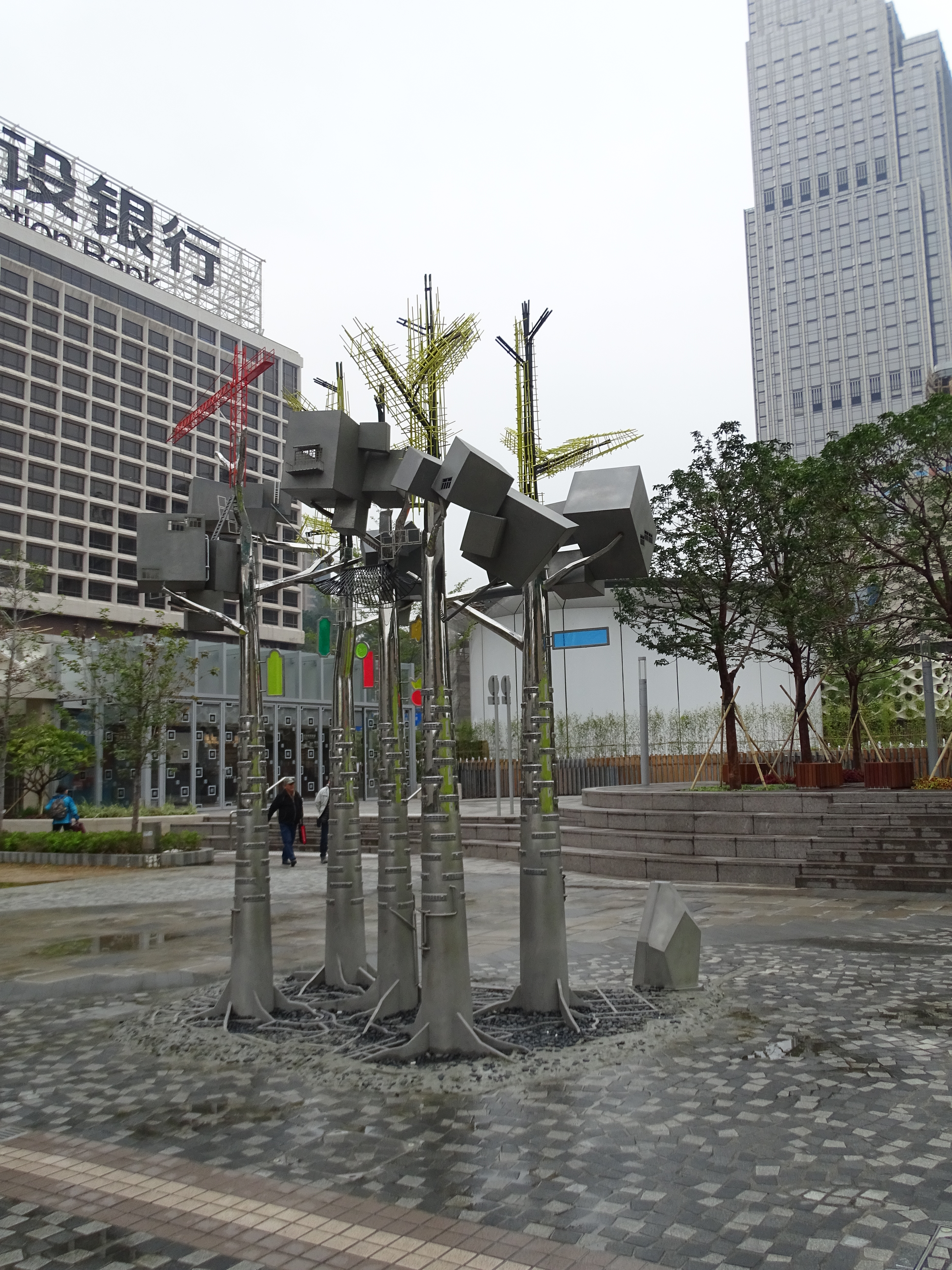 Skulptur "Million Lights" von Kevin Fung, Art Square at Salisbury Garden / Hong Kong Cultural Centre Complex HKCCC, Ausstellung "Growing City．Growing Home", geöffnet am 8. Dezember 2017, Kowloon, Hong Kong